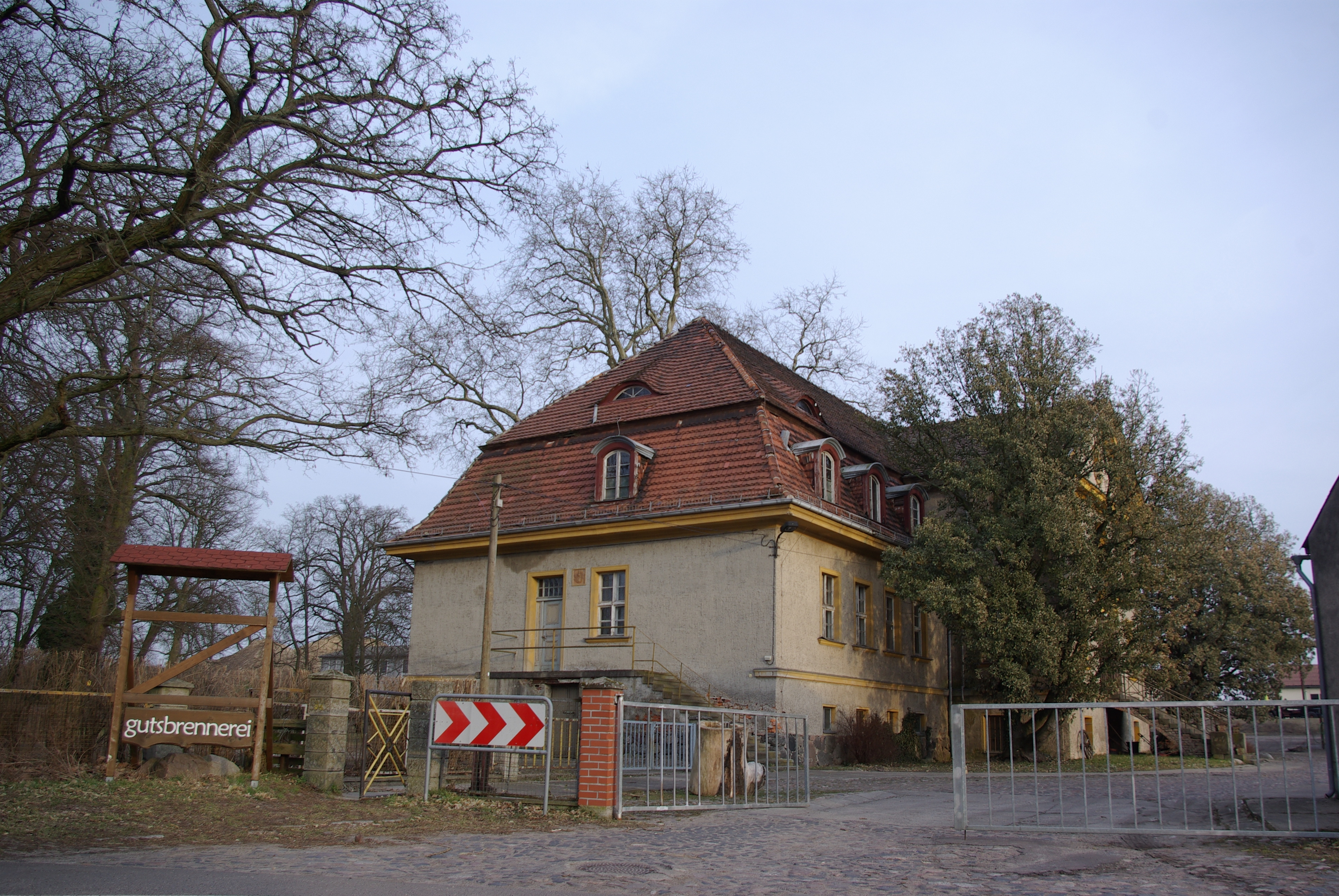 Trebbin In Brandenburg. Das Gut und die Brennerei stehen unter Denkmalschutz.